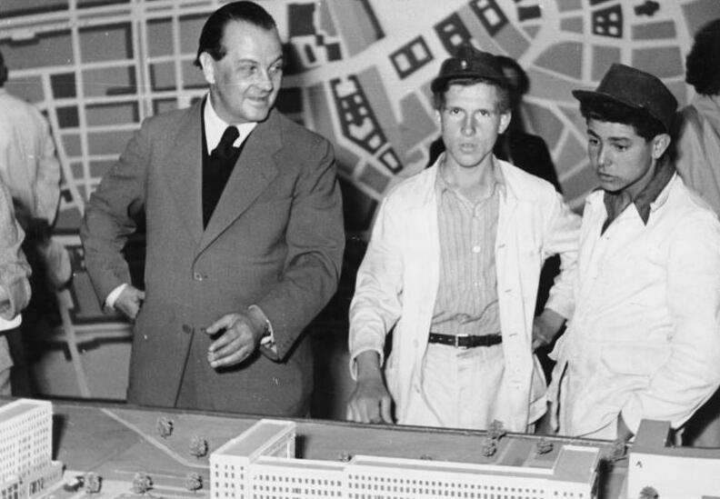 Berlin, Ausstellung der Bauakademie Zentralbild / Schmidtke, 2.5.1952 Ausstellung der Bau-Akademie zum Nationalen Aufbau-Programm. In der Deutschen Sporthalle am Strausberger Platz in Berlin wurde am 2.5.1953 eine Ausstellung der Deutschen Bau-Akademie über das Nationale Aufbau-Programm eröffnet. UBz: Professor Paulick unterhält sich mit jungen Bauarbeitern über das Modell der neuen Stalin-Allee. Abgebildete Personen: Paulick, Richard, Prof.: Architekt, DDR